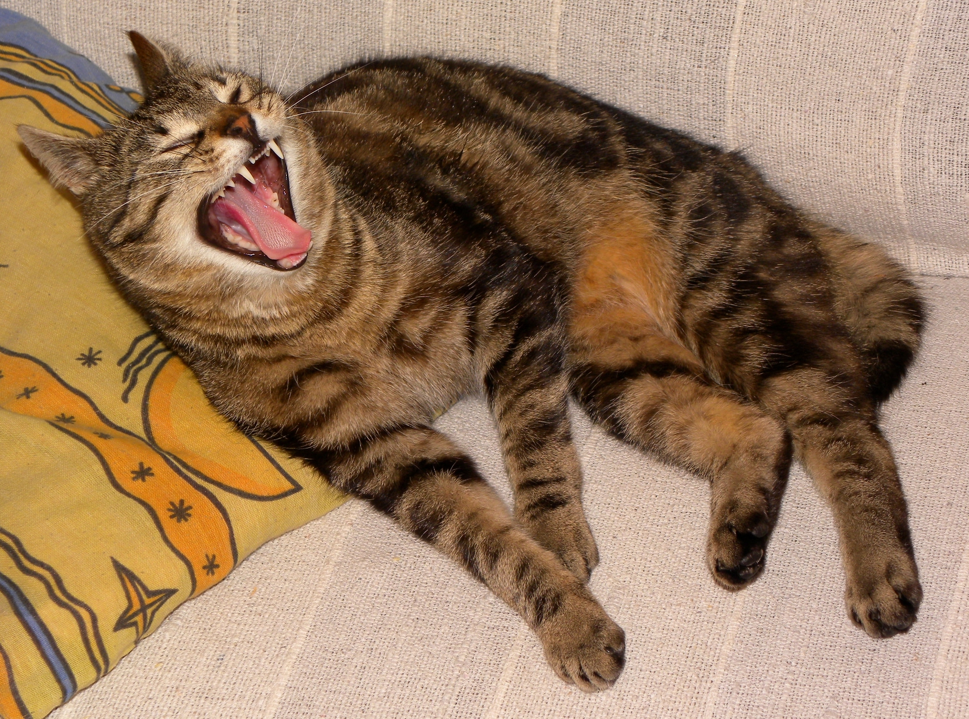 Kot wielorasowy